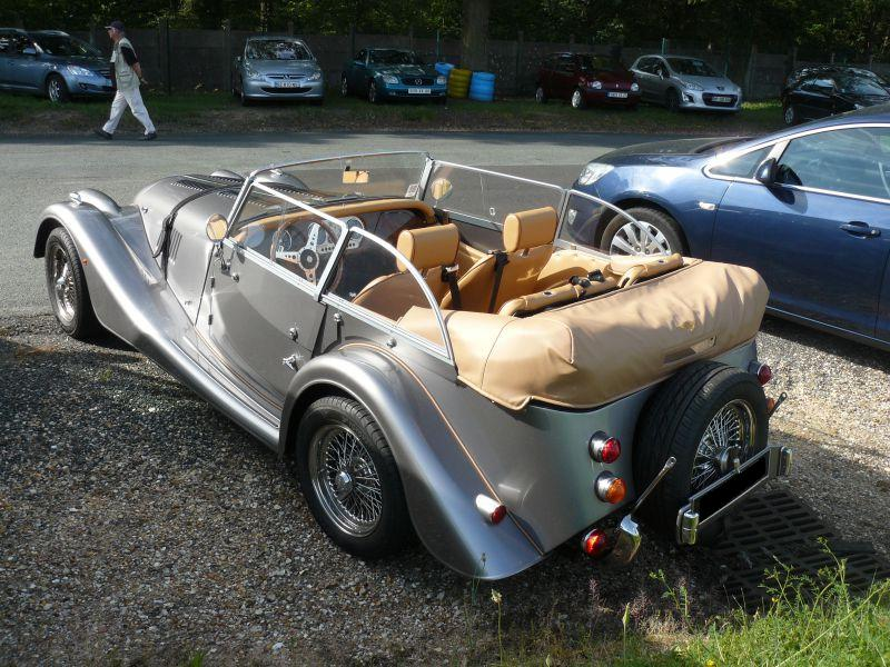 Montlhery 2012